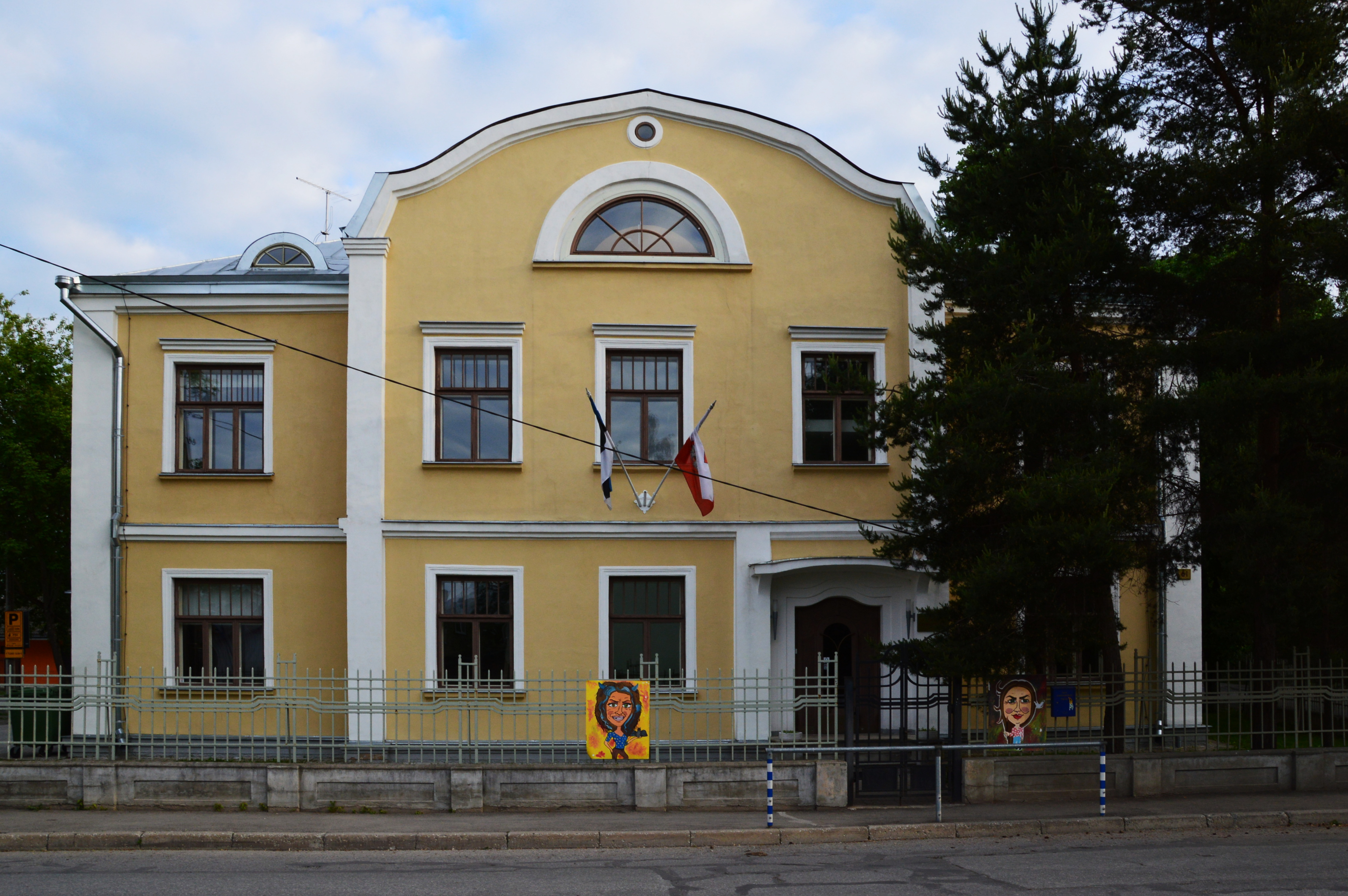 Tartu Lastekunstikooli hoone Tiigi tänaval.